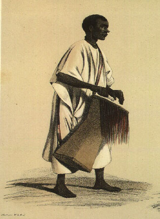 Griot du pays de Galam (illustration de Voyage dans l'Afrique occidentale, comprenant l'exploration du Sénégal... exécuté en 1843 et 1844 par une commission composée de MM. Huard-Bessinières, Jamin, Raffenel, Peyre-Ferry et Pottin-Patterson)